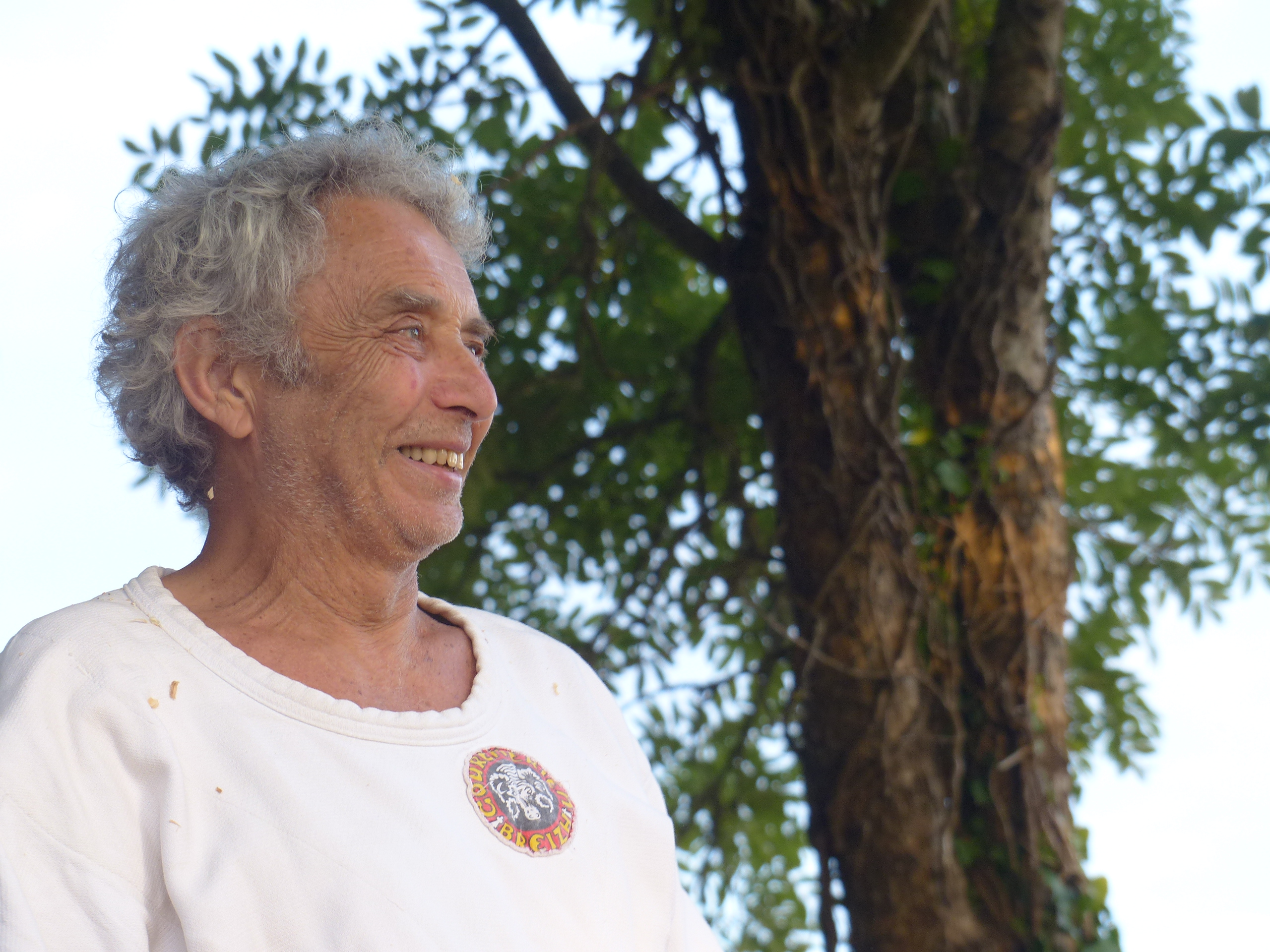 Erwan Evenou portant la chemise en toile à manches courtes serrée par une ceinture nommée Roched, tenue de Gouren